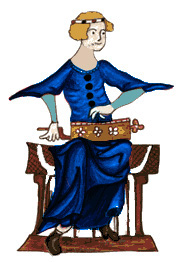 Dibujo de Symphonia (teclado). Psalterio Luttrel (1325)